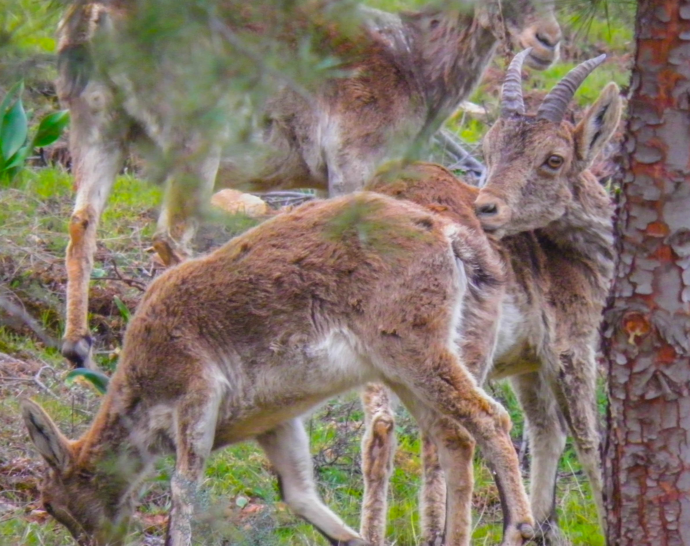 Cabras en Sierra de Lújar